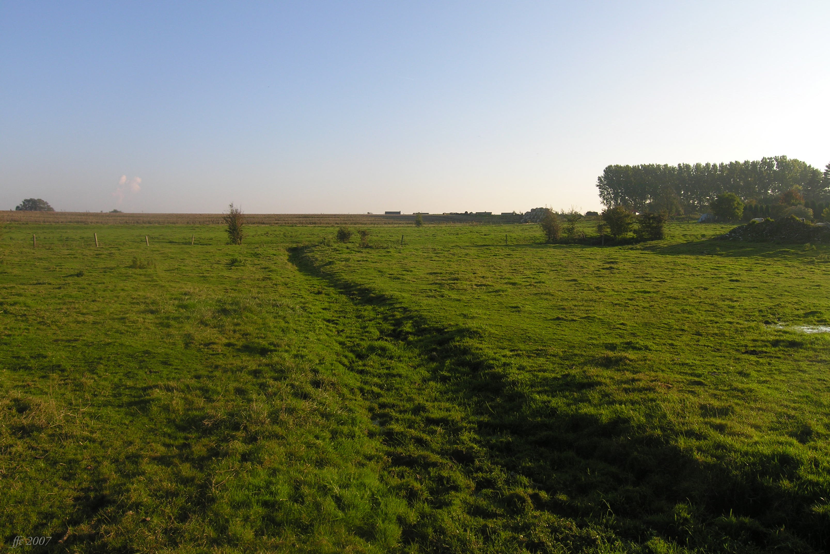 Lens-Saint-Servais (Belgium) Wet meadows with tributary from the river Jeker Prés humides avec affluent du Geer Prats húmids amb afluent del Jeker Natte weiden met bijrivier van de Jeker